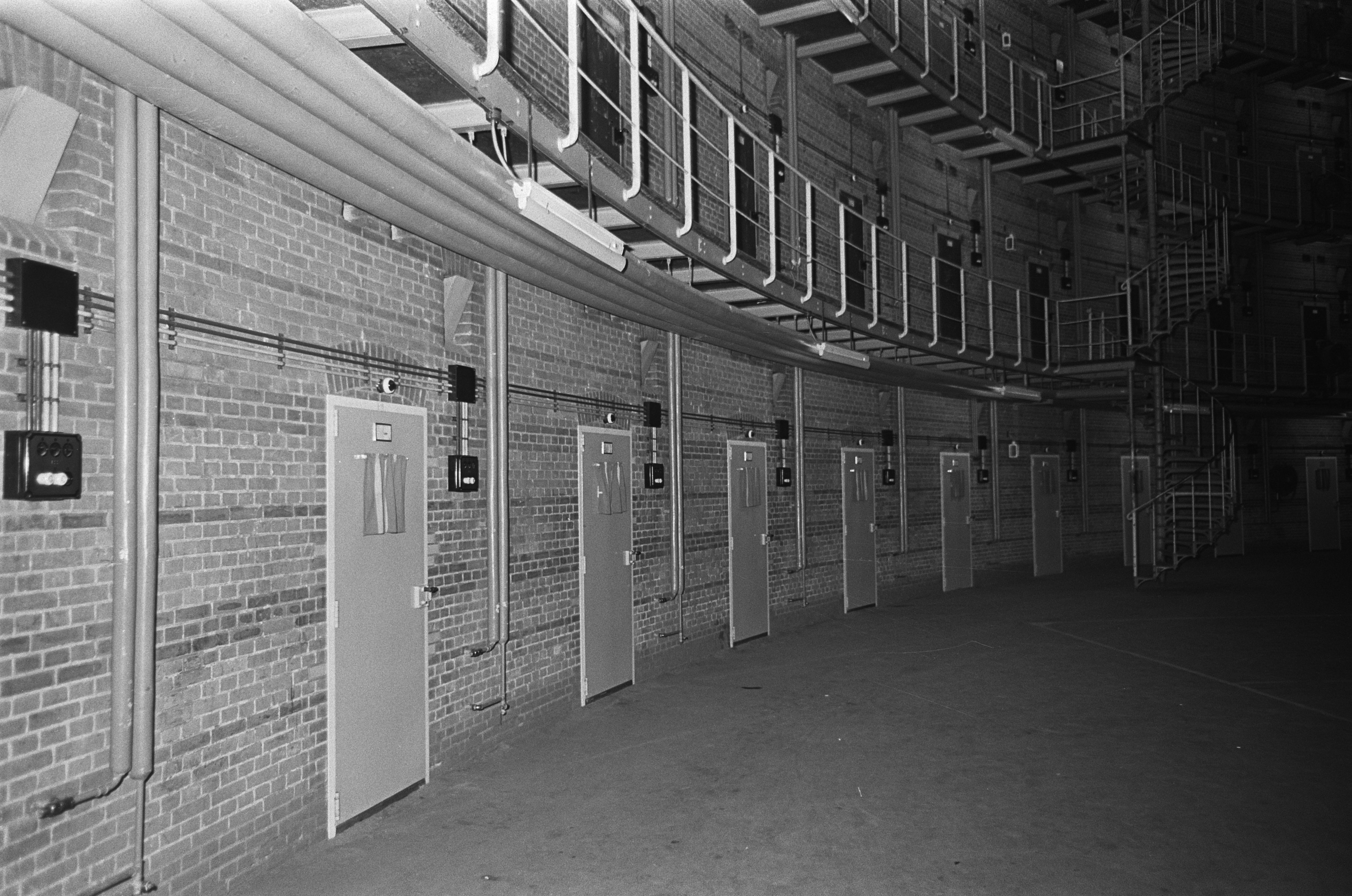 Collectie / Archief : Fotocollectie Anefo Reportage / Serie : [ onbekend ] Beschrijving : Gevangenis te Breda, in en exterieurs Datum : 13 februari 1967 Locatie : Breda Trefwoorden : gevangenissen Fotograaf : Nijs, Jac. de / Anefo Auteursrechthebbende : Nationaal Archief Materiaalsoort : Negatief (zwart/wit) Nummer archiefinventaris : bekijk toegang 2.24.01.05 Bestanddeelnummer : 920-0733